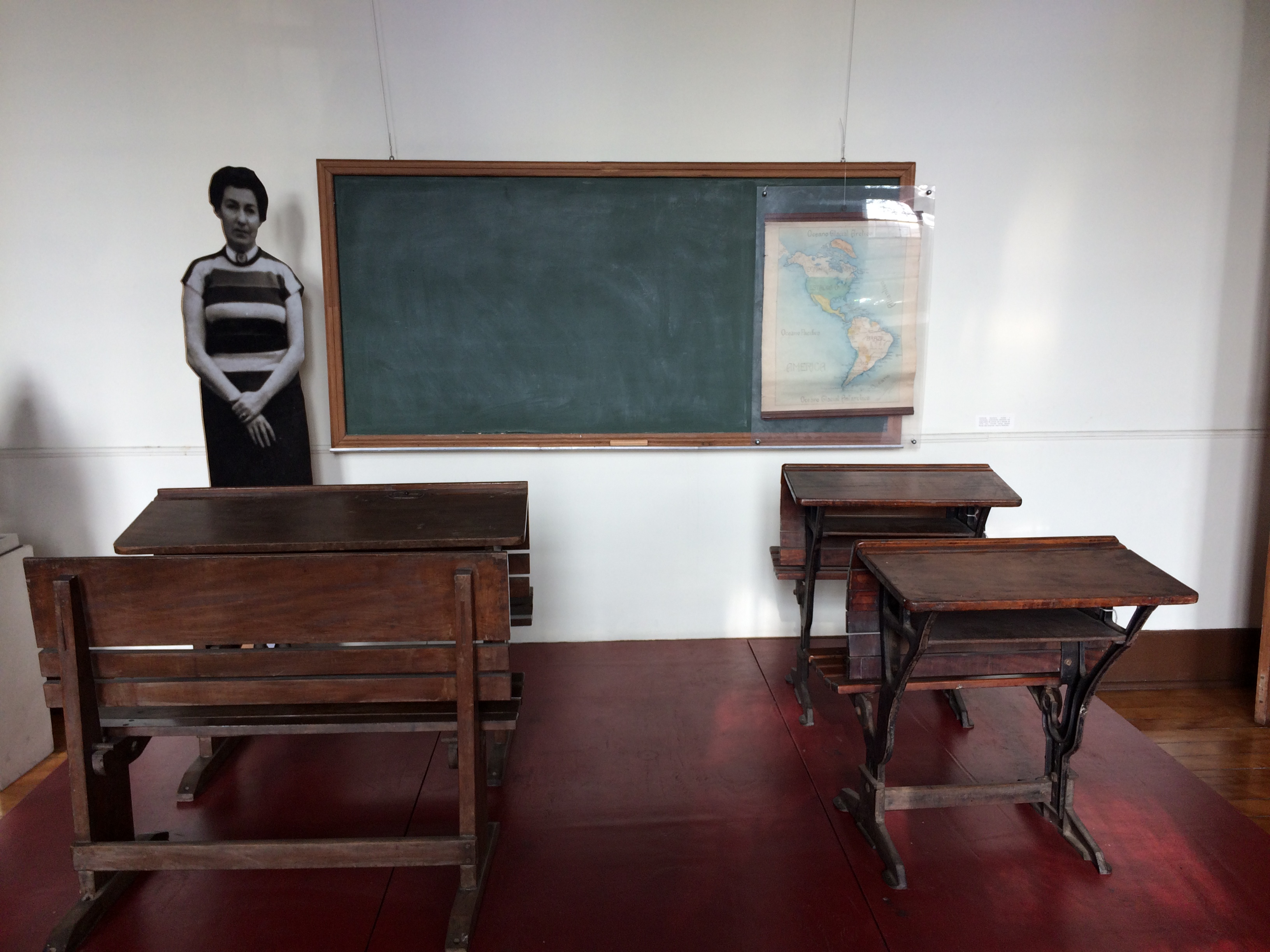 Carteiras escolares utilizadas na rede de ensido do Grupo Escolar, que antecedeu o Museu de Santo André Dr. Octaviano Armando Gaiarsa, em Santo André (SP), Brasil.